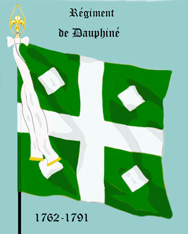 Ordonnanzfahne eines königlich französischen Infanterie-Regiments. - Entnommen und überarbeitet aus: „LES UNIFORMES ET LES DRAPEAUX DE L'ARMÉE DU ROI“ Marseille 1899. (Drapeau d'Ordonnance d' un régiment française d'infanterie royale.)